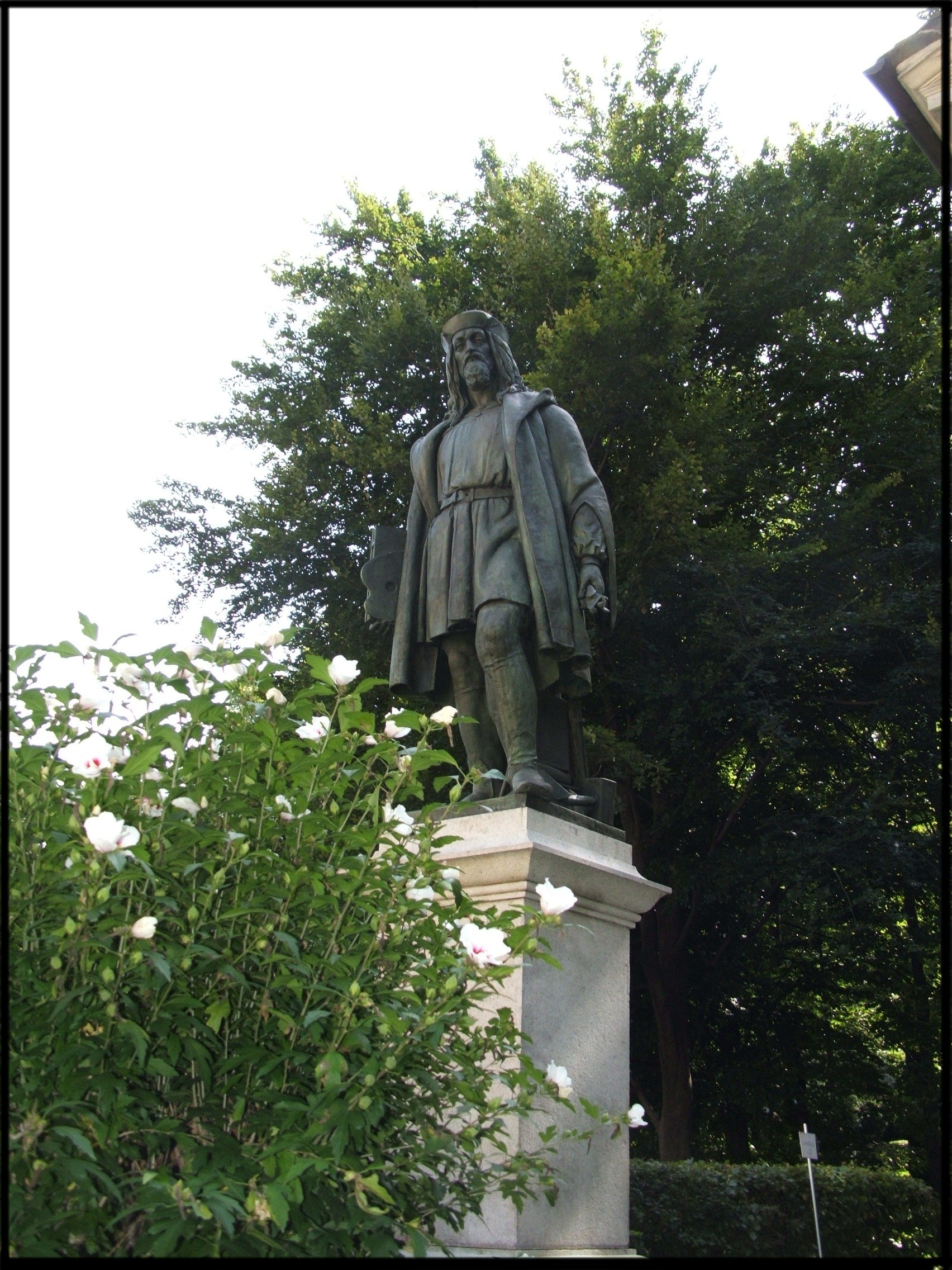 Sacro Monte di Varallo - statua a Gaudenzio Ferrari (davanti alla Cappella I); opera di Pietro Della Vedova (1874).